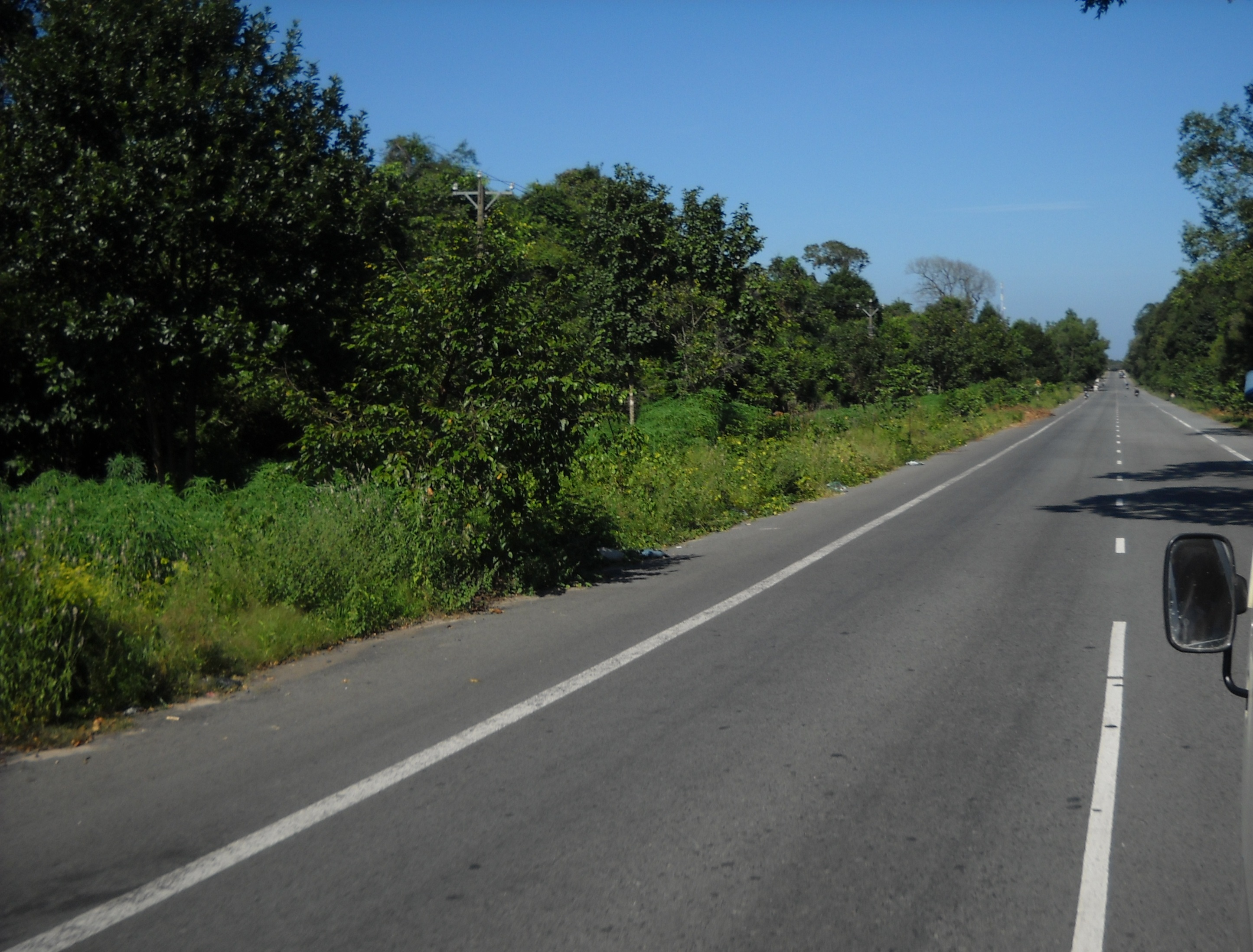 Quốc lộ 55, đoạn Lagi